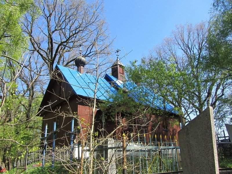 Свята-Іаана-Багаслоўская царква ў вёсцы Дамашанах Смалявіцкага раёна Мінскай вобласці